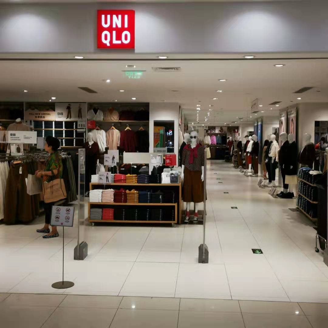 中文（中国大陆）: 位于北京西直门的优衣库店